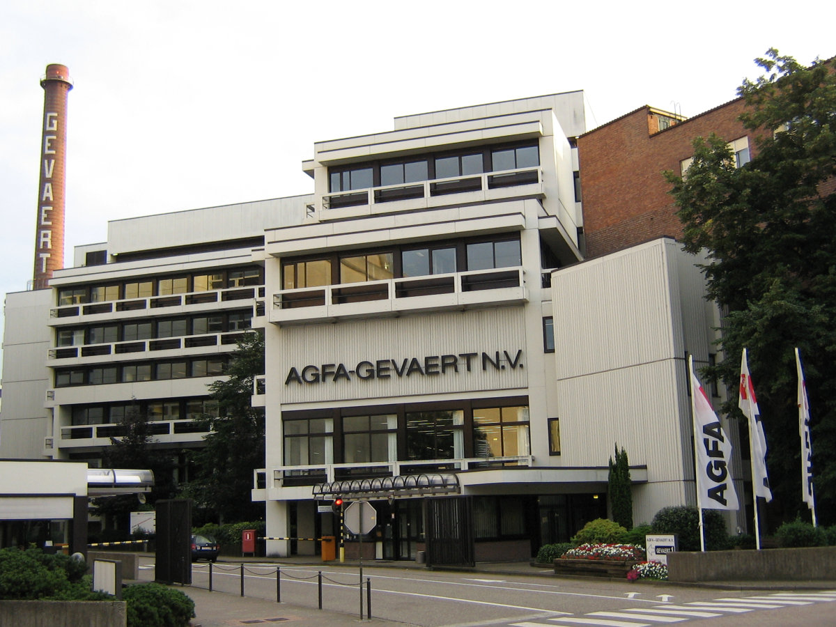 Agfa Gevaert plant in Mortsel, Belgium.